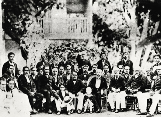 Photographie « officielle » de la réunion de Tahiti à la France, avec en son centre les deux protagonistes : Pomare V et Isidore Chessé.